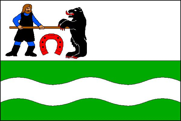 Česky: vlajka obce Dolní Lánov